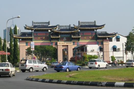 Gambar diambil di Padungan. Perhatikan Patung Besar Kuching.